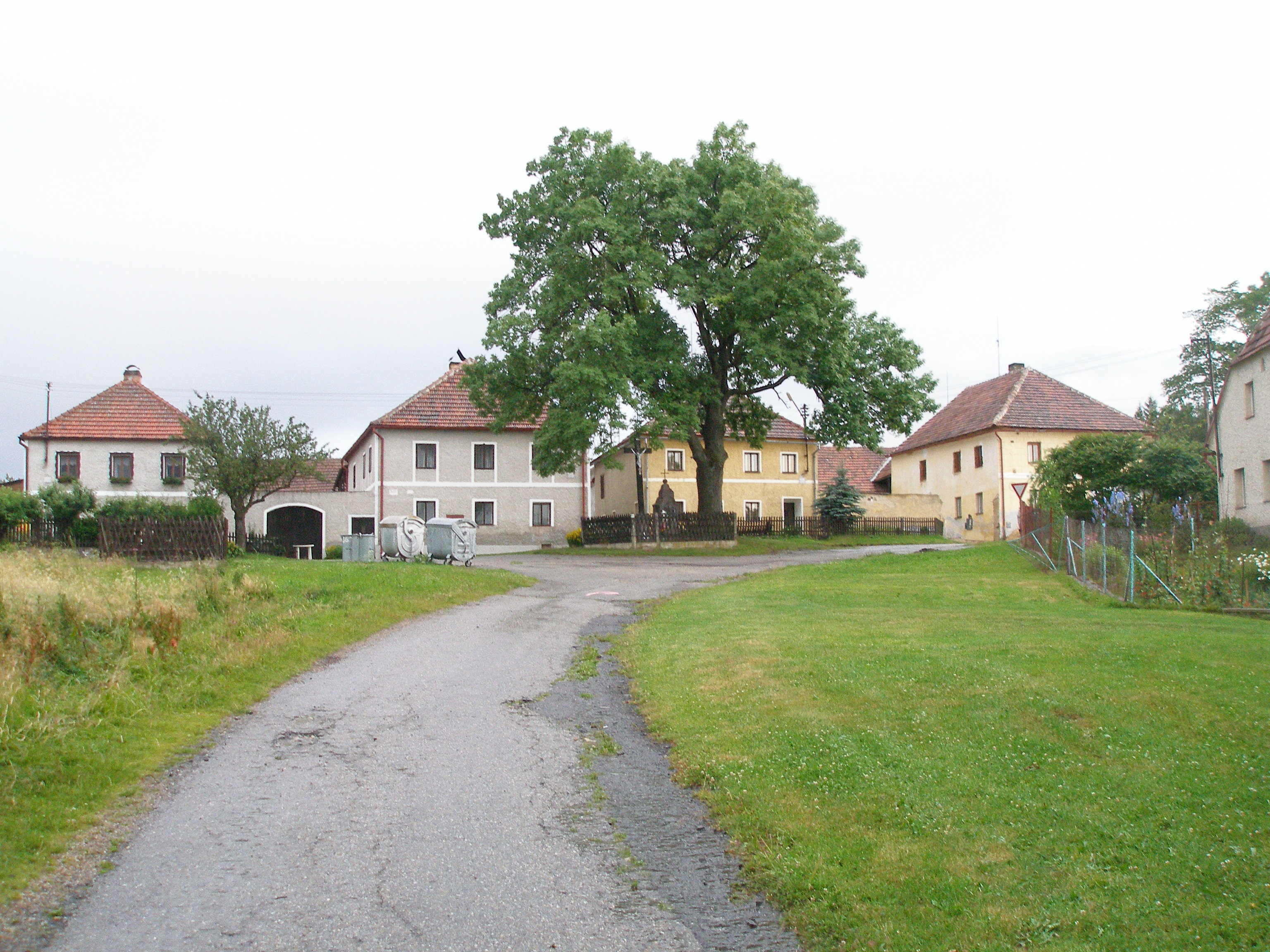 Koryto (Hundsnursch) - severozápadní kout návsi